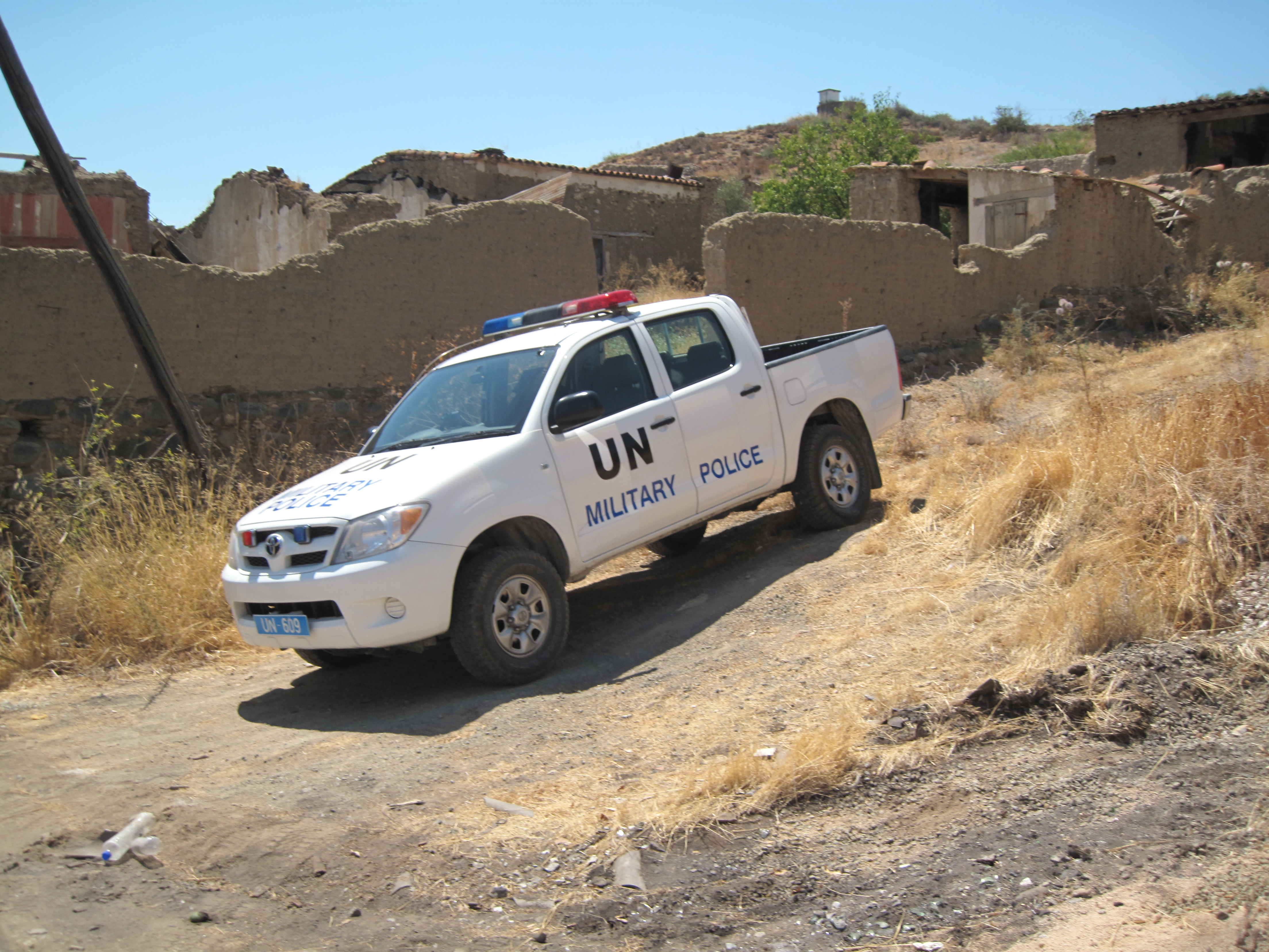 MP van de UN op Cyprus